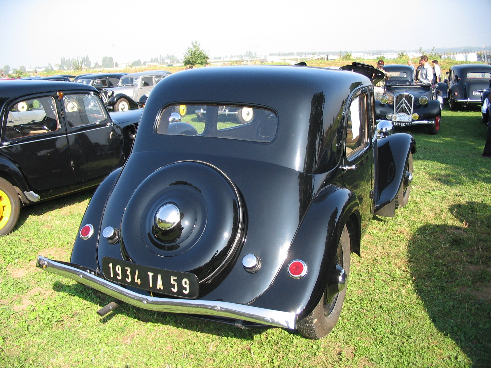 Citroën Traction Avant à malle borgne